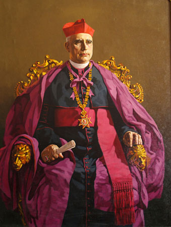 Jan Nepomuk Hejčl (1868 - 1935), Římskokatolický teolog, kněz a spisovatel.